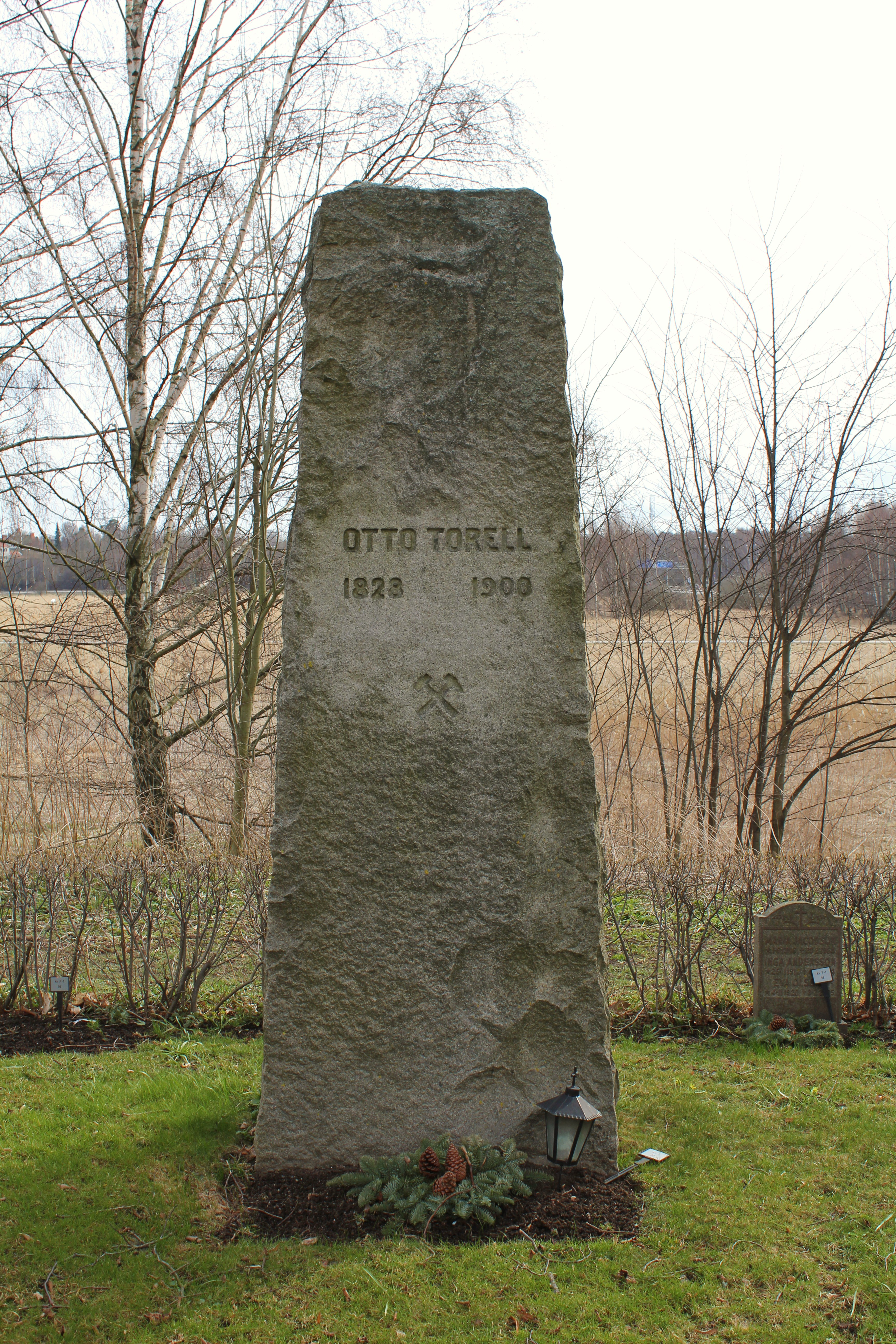 Otto Torells gravsten vid Brännkyrka kyrka i stadsdelen Örby slott, Stockholm.